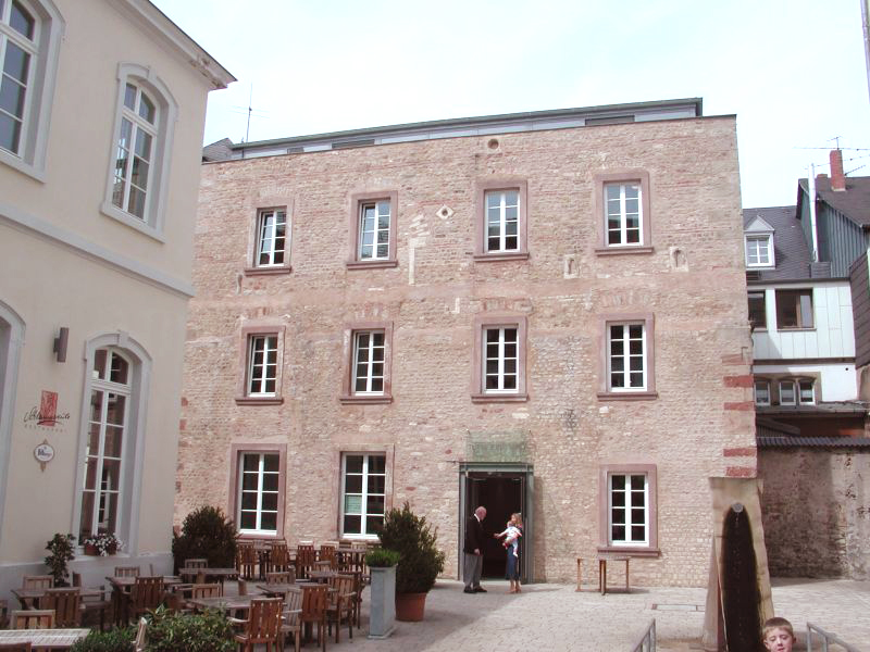 Turm Jerusalem der Stadt Trier